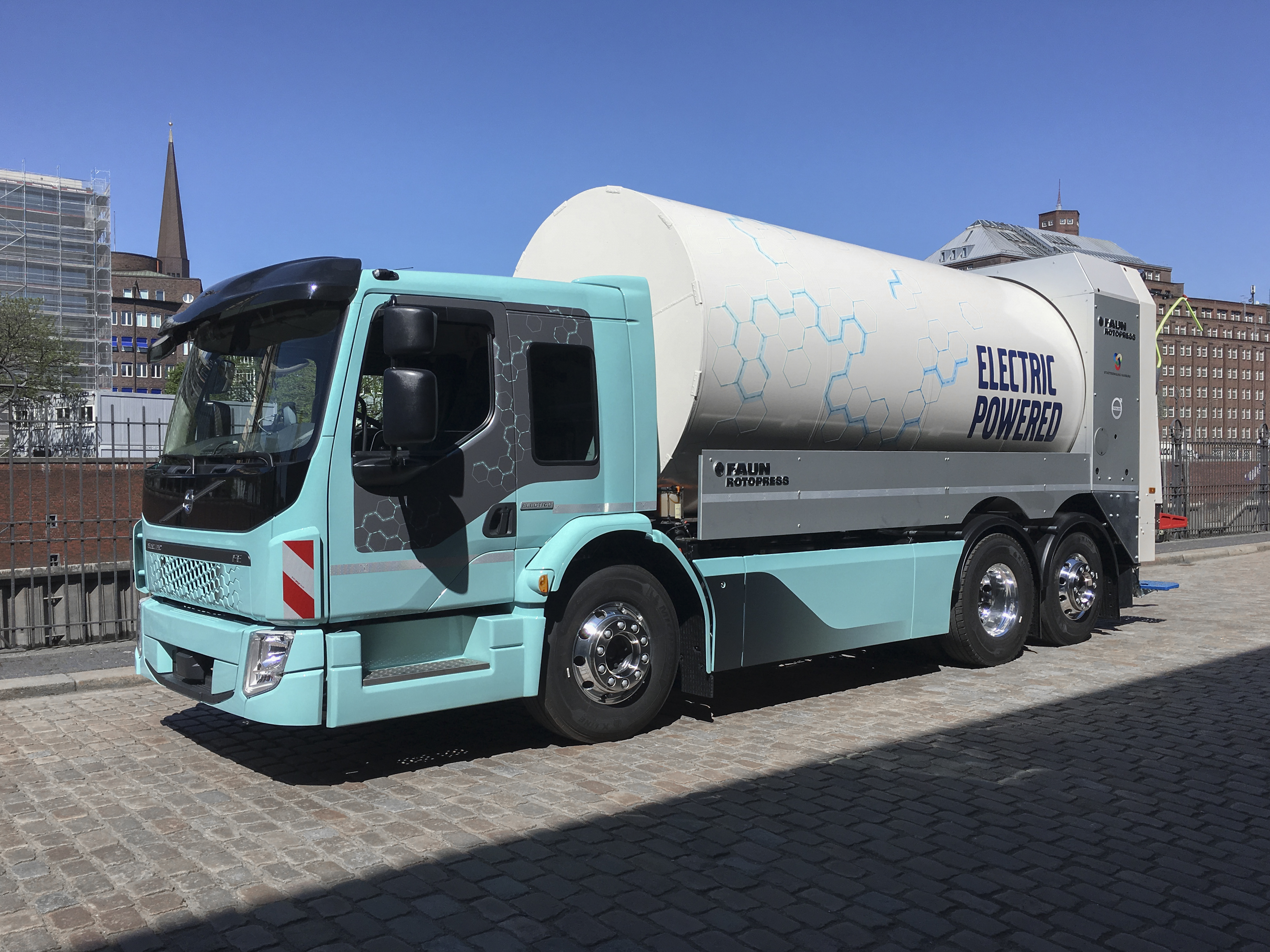 Baureihe FE (Electric) von Volvo Trucks